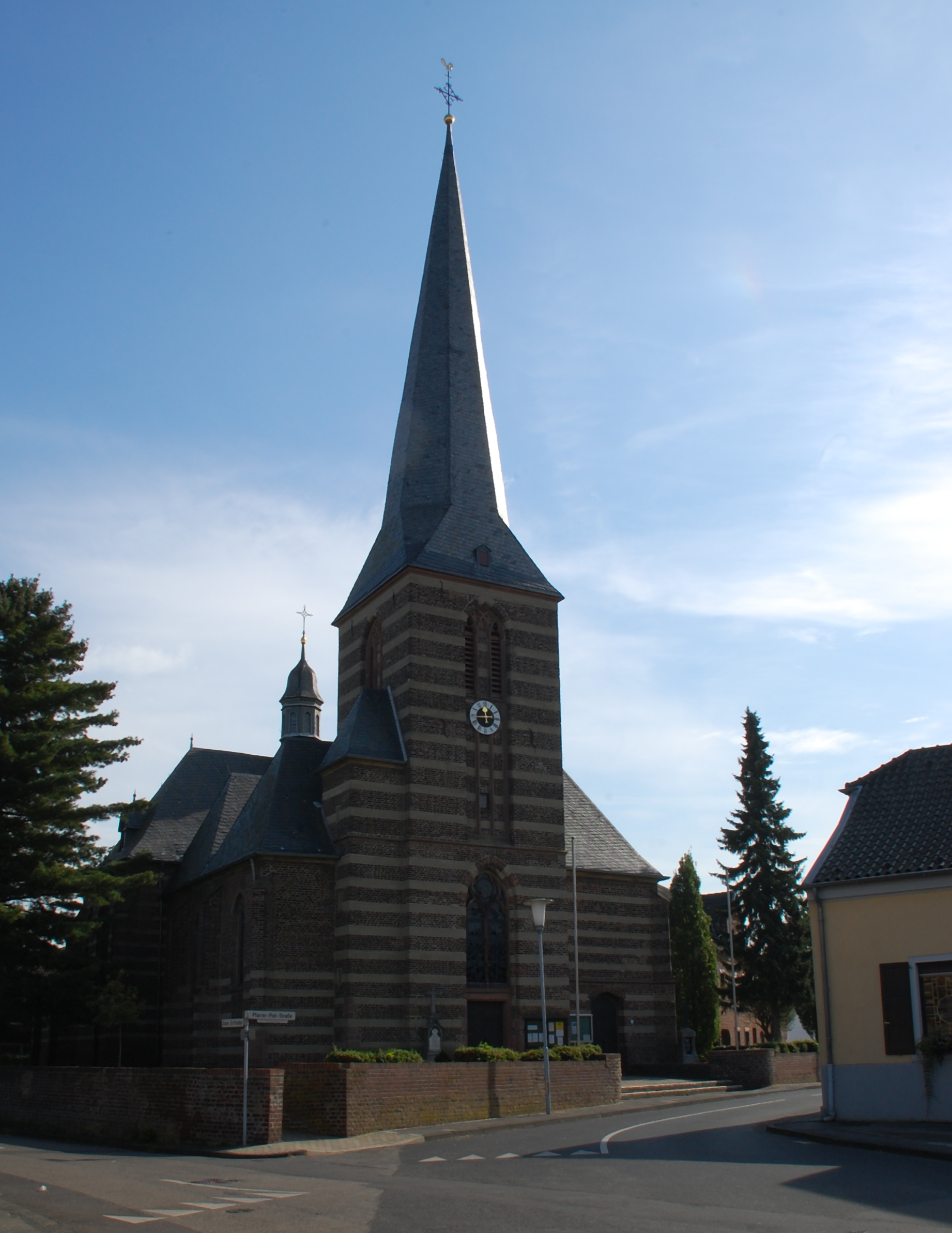 Pfarrkirche St. Kosmas und Damian in Glesch, Bergheim